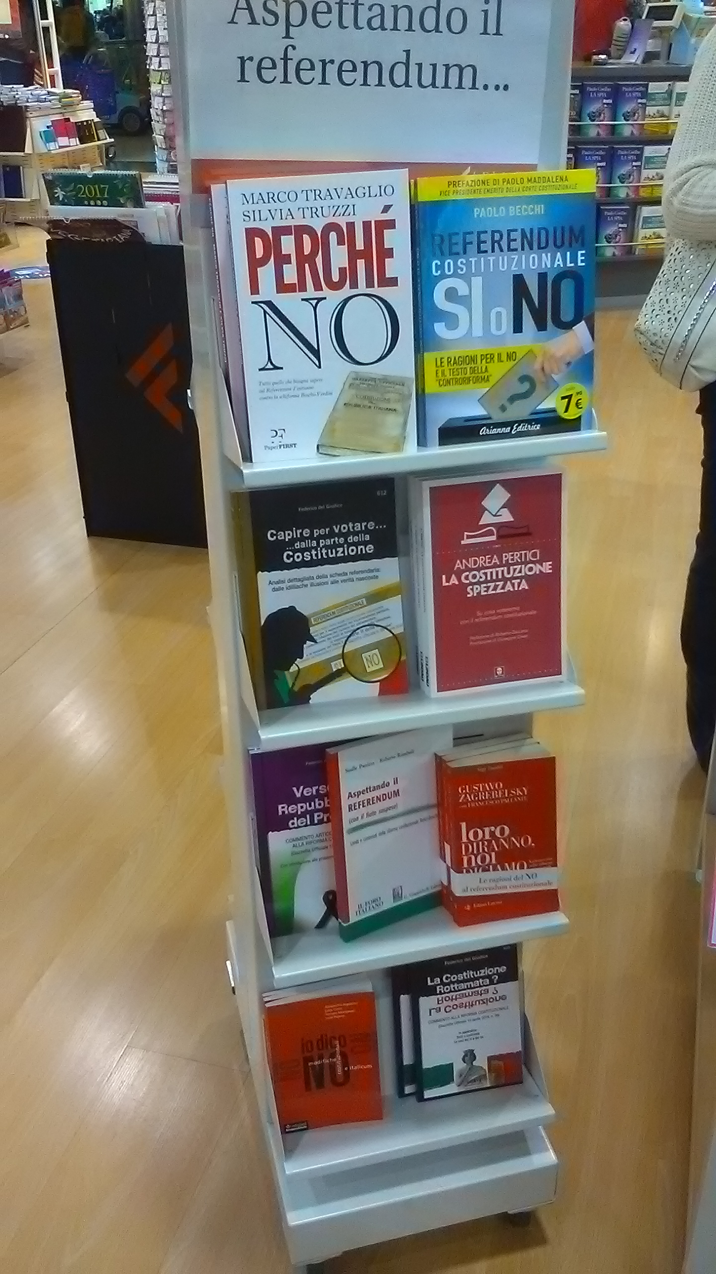 Libri sul referendum costituzionale 2016